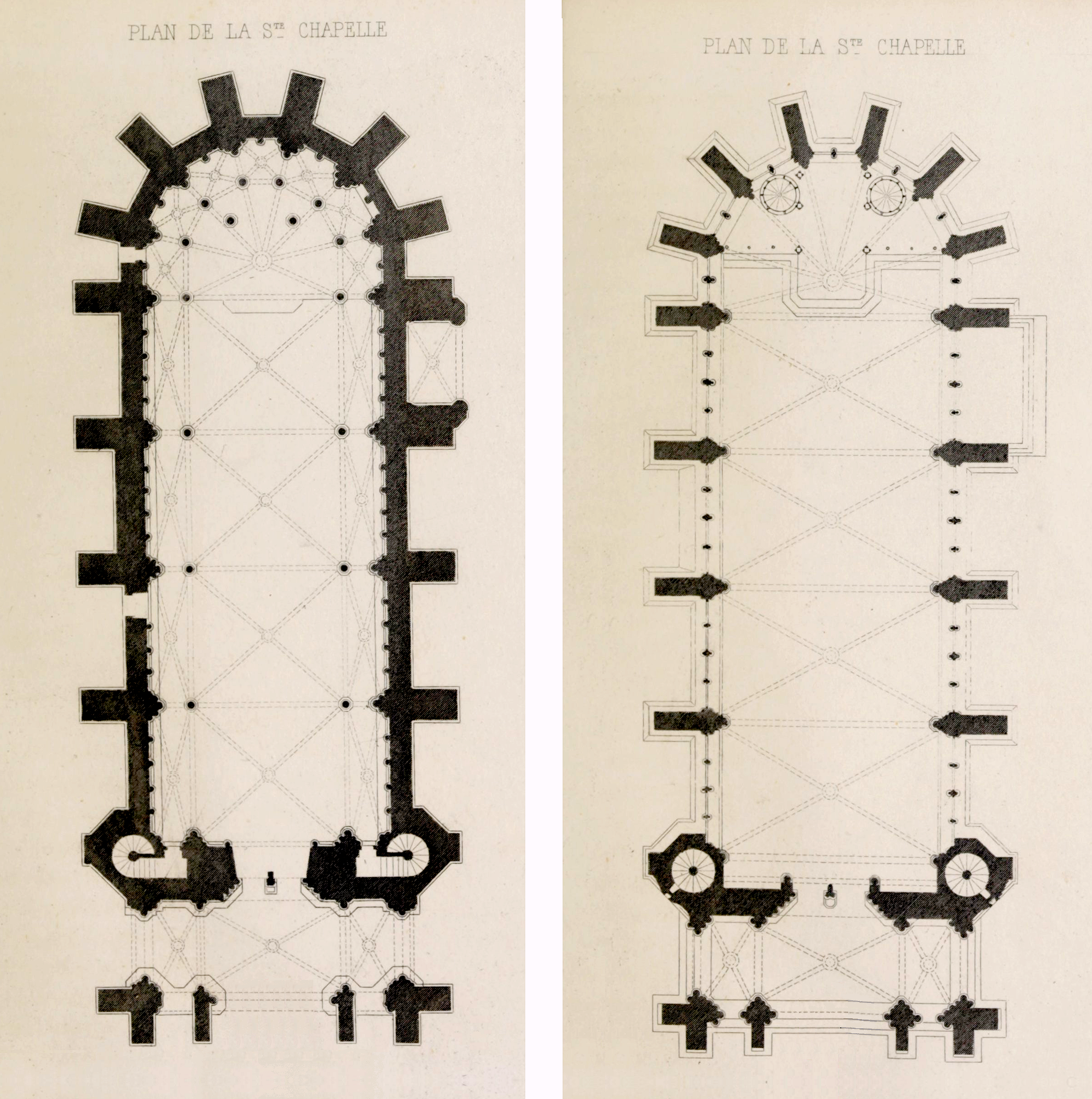 Plan de la Sainte-Chapelle - chapelle basse (à gauche) et chapelle haute (à droite).